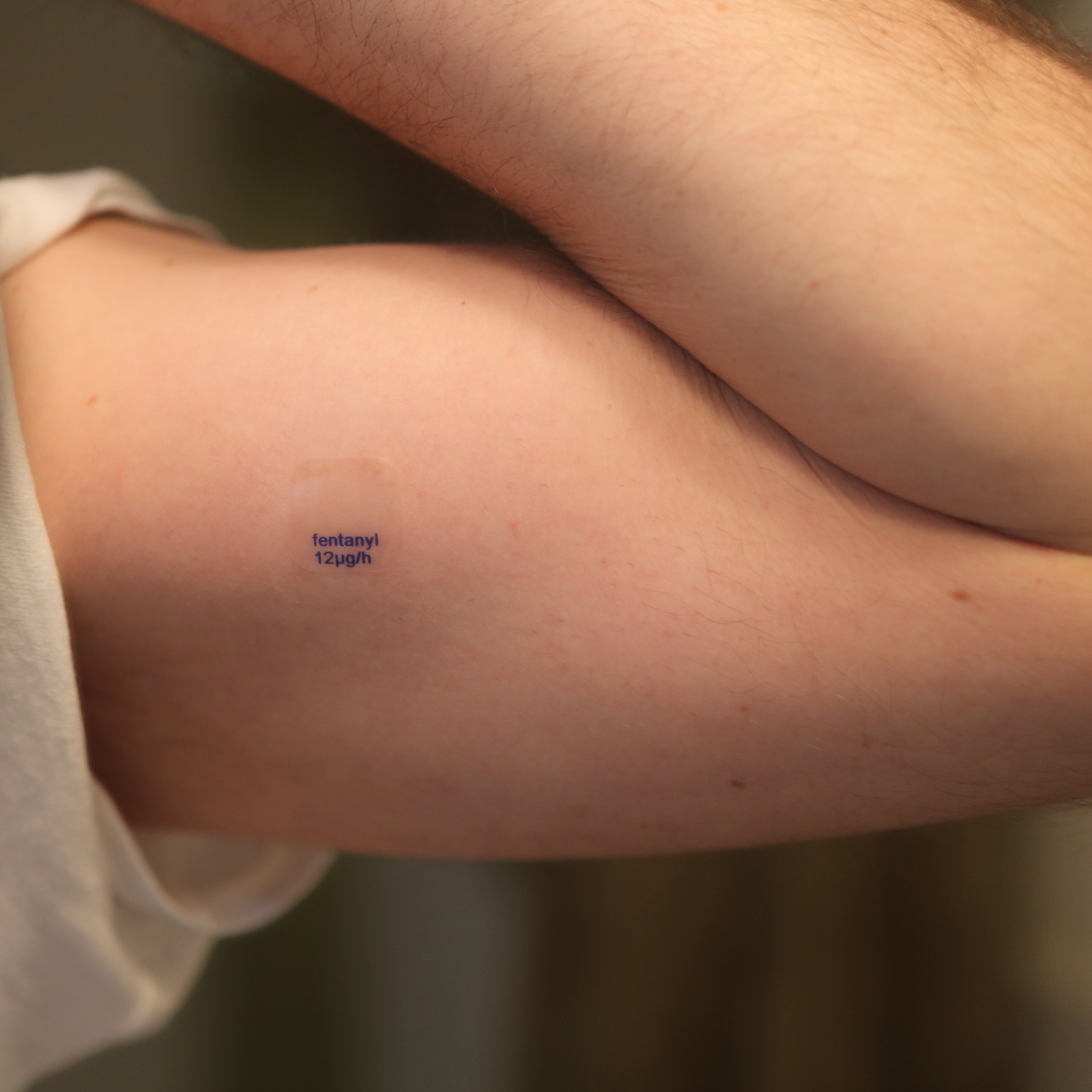 מדבקת פנטניל בקצב שחרור של 12 מיקרוגרם בשעה, מודבקת לעור.